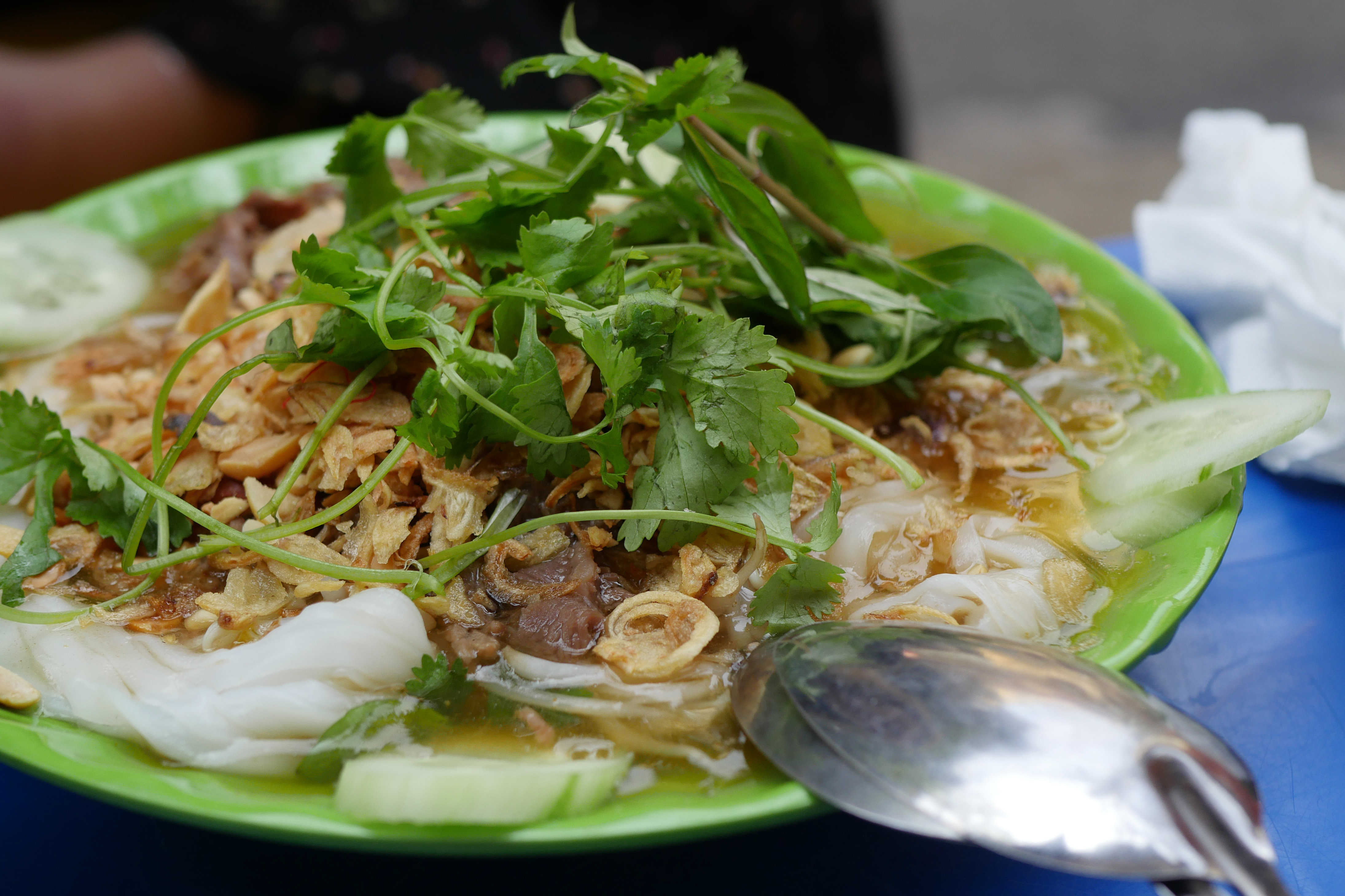 Un plat de bánh cuốn